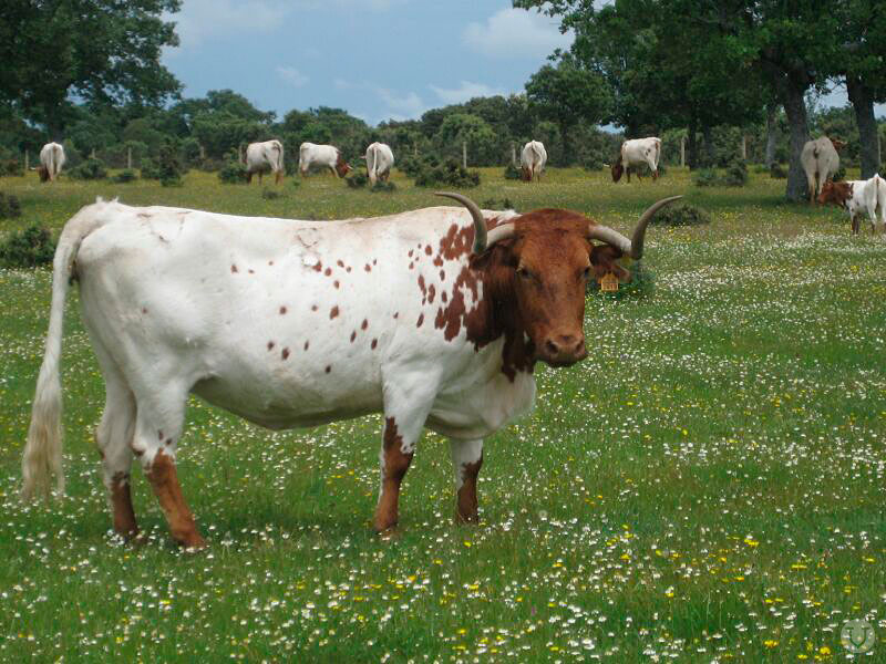 Imagen en primavera de un ejemplar de vaca berrenda en colorado. Fotografía tomada en la Dehesa de Valdelazarza (Salamanca)